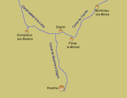 Plan des "Canal de Roanne à Digoin" in Frankreich